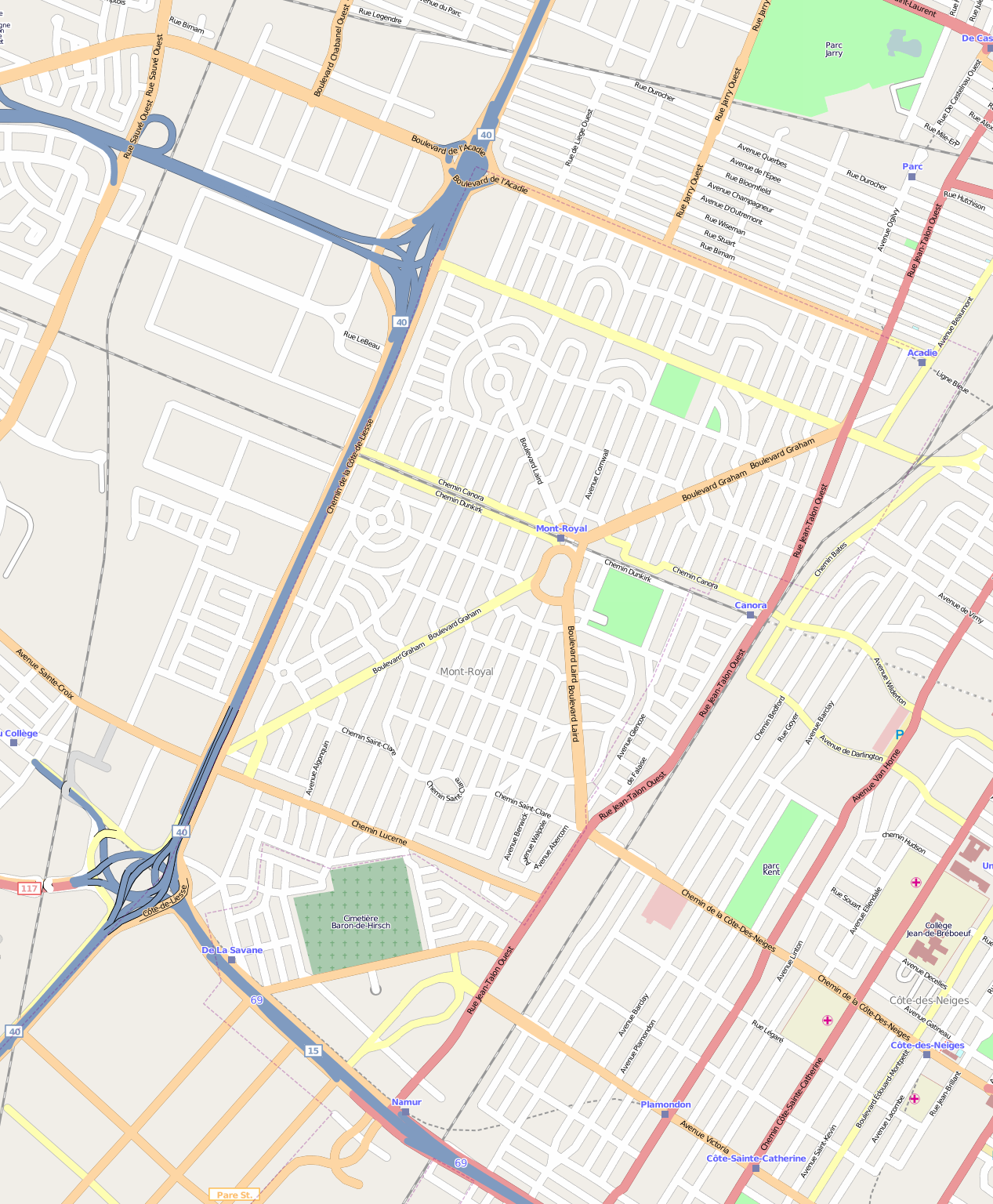 Carte de Ville Mont-Royal